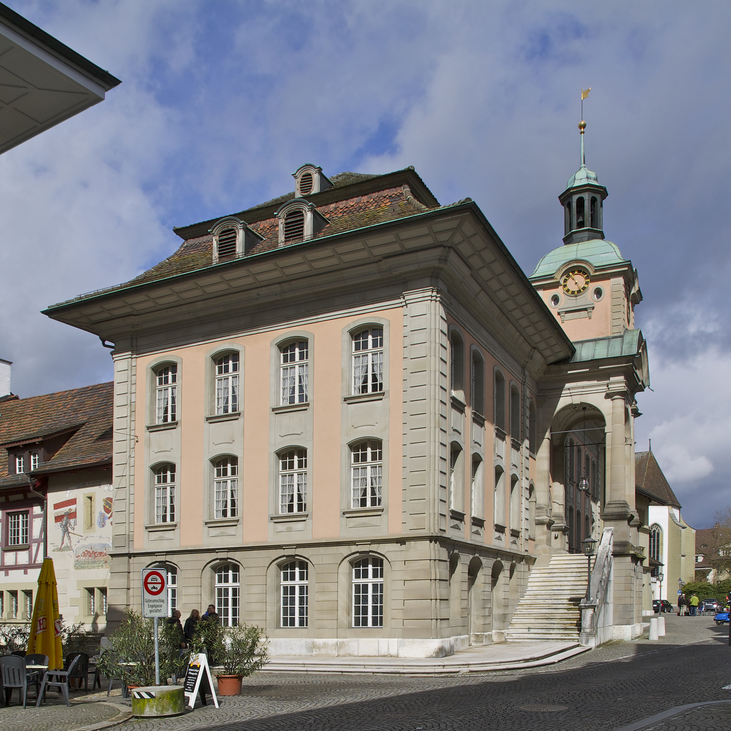 Das Rathaus Zofingen, Süd- und Ostfassade.